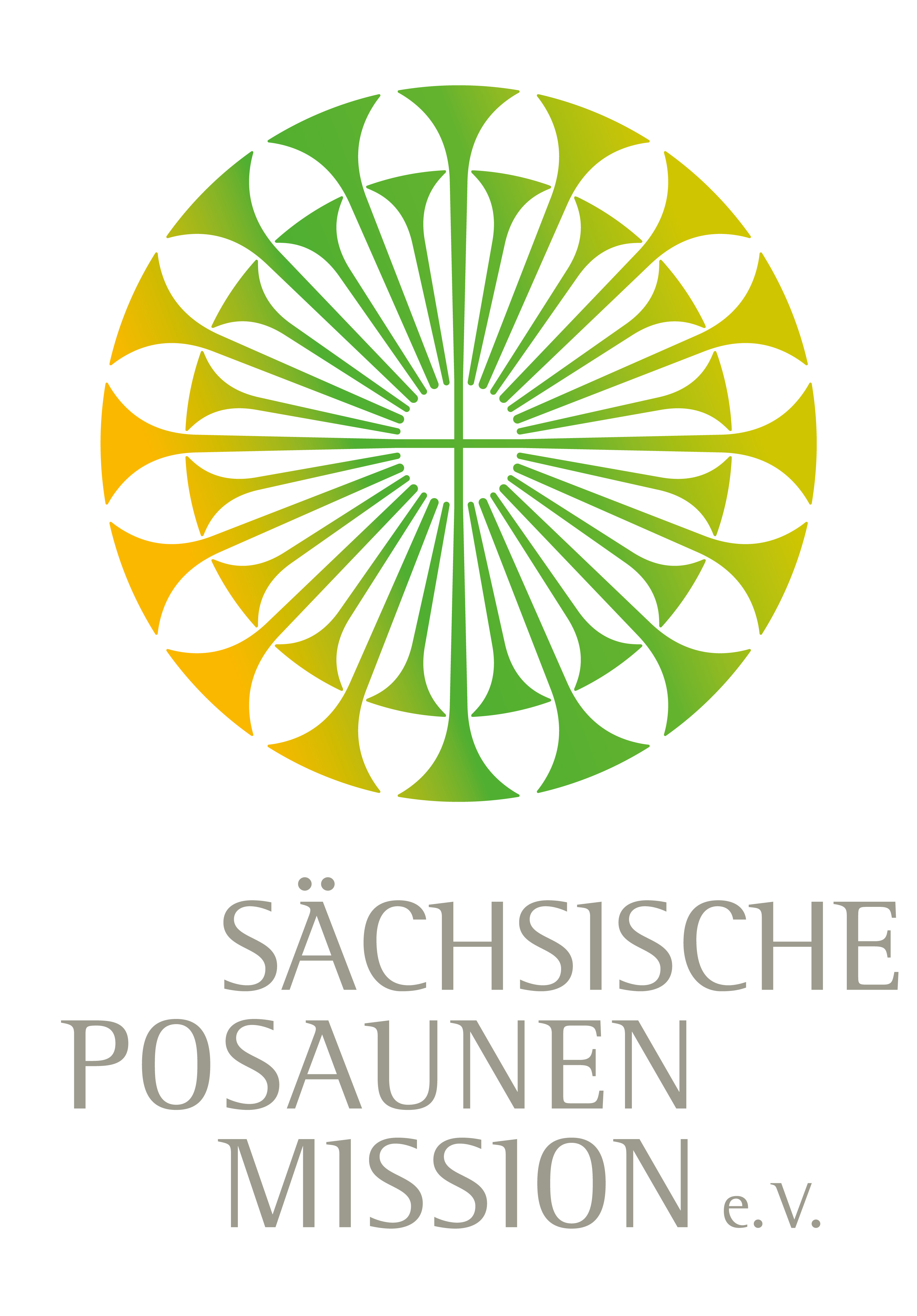 Logo der Sächsischen Posaunenmission e.V.